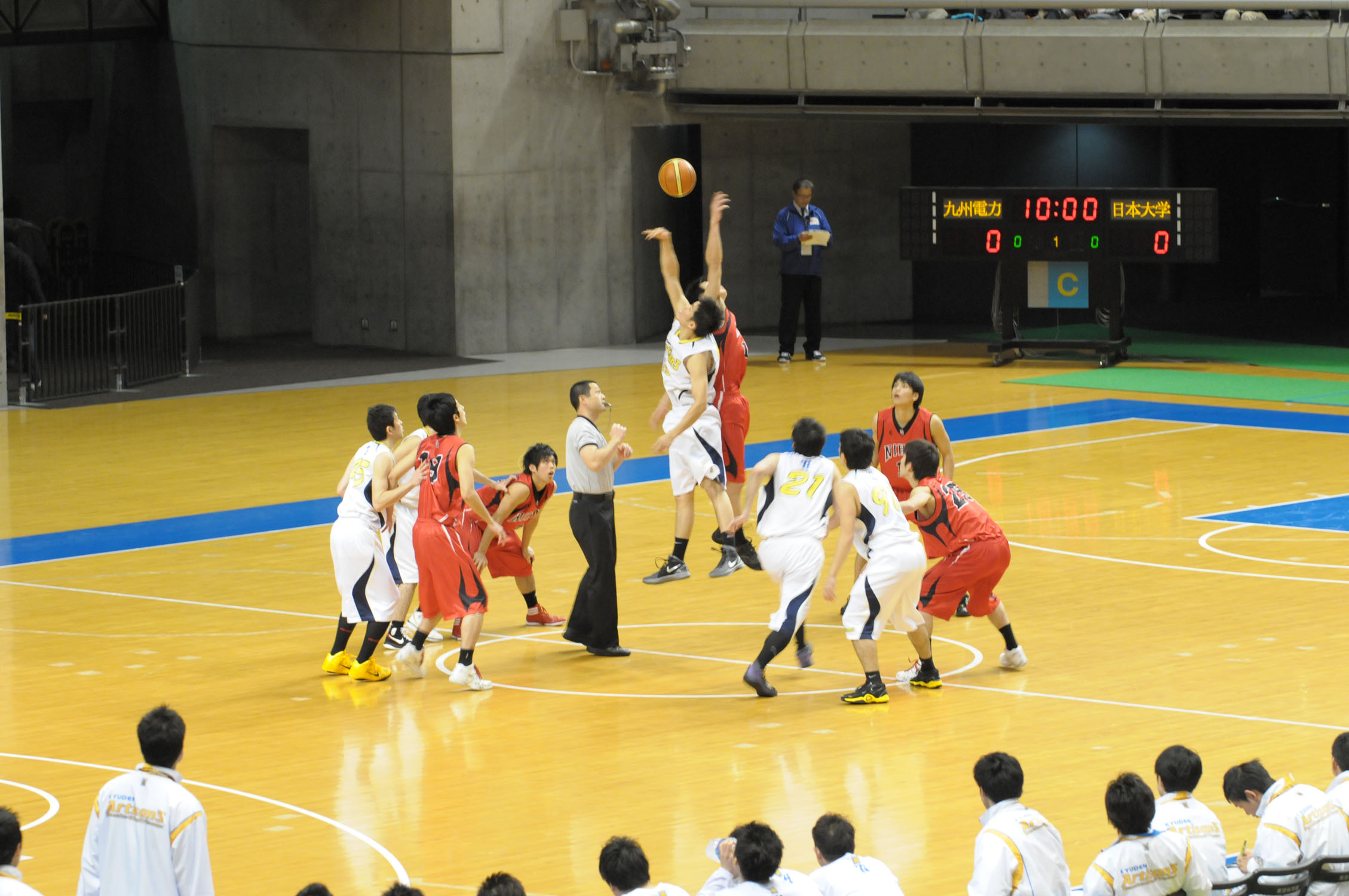 2012年全日本総合バスケットボール選手権大会2回戦、九州電力対日本大学。東京体育館で。